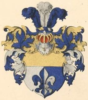 Bunge suguvõsa aadlivapp